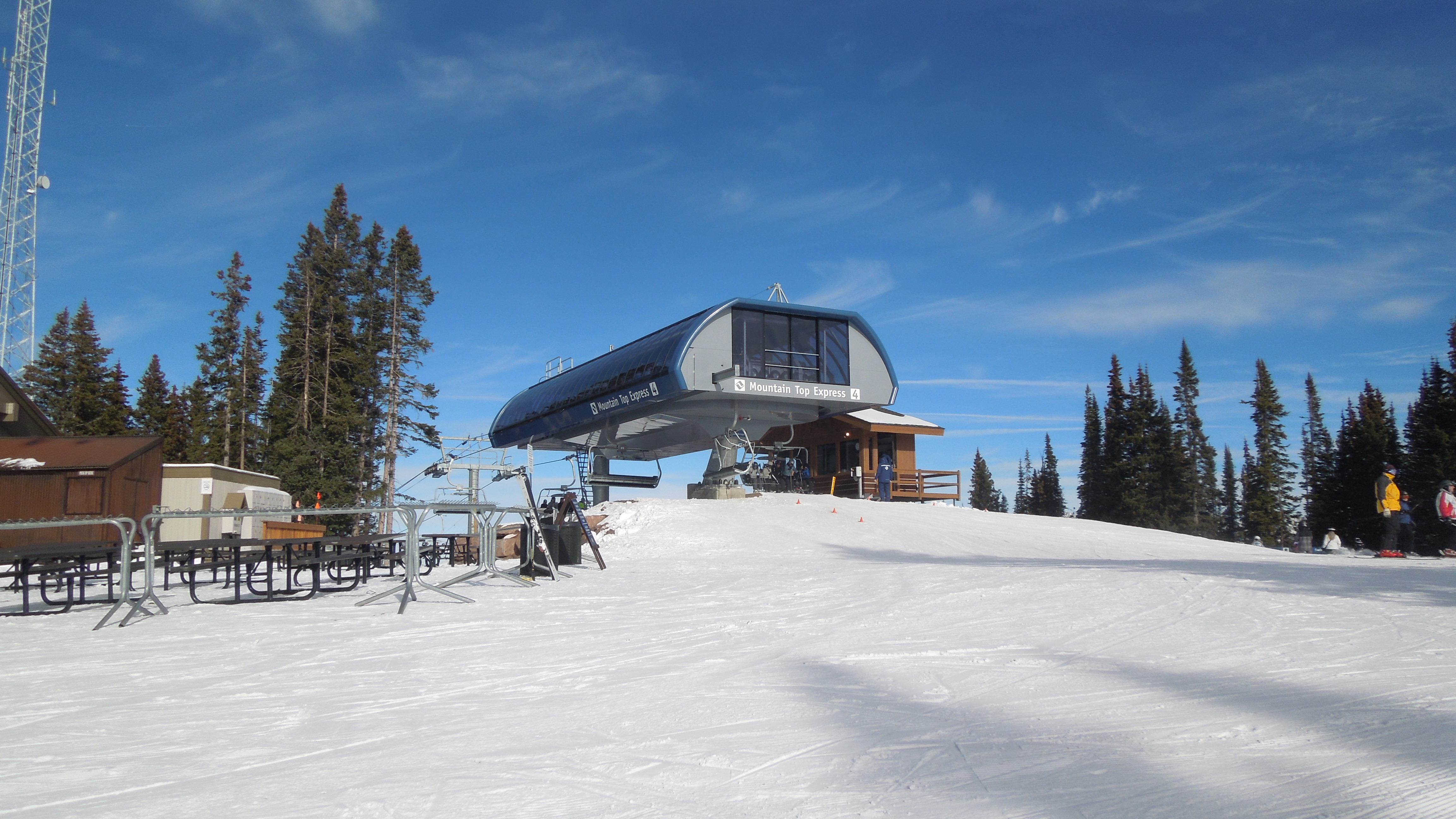 Taken at Vail Ski Resort; November 28, 2013. DReifGalaxyM31 (talk) 16:14, 21 February 2014 (UTC)